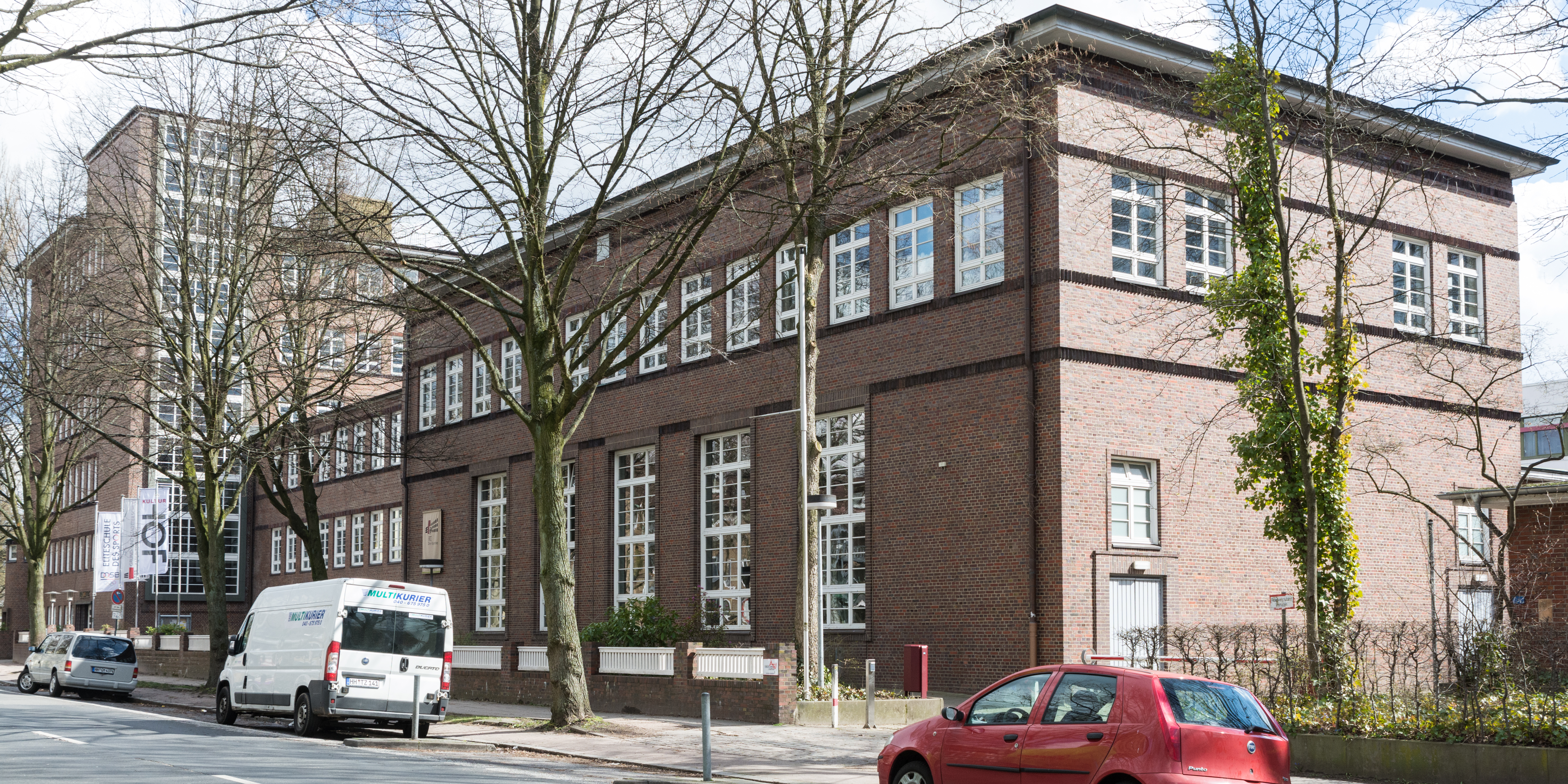 Schule Alter Teichweg in Hamburg-Dulsberg. This is a photograph of an architectural monument.